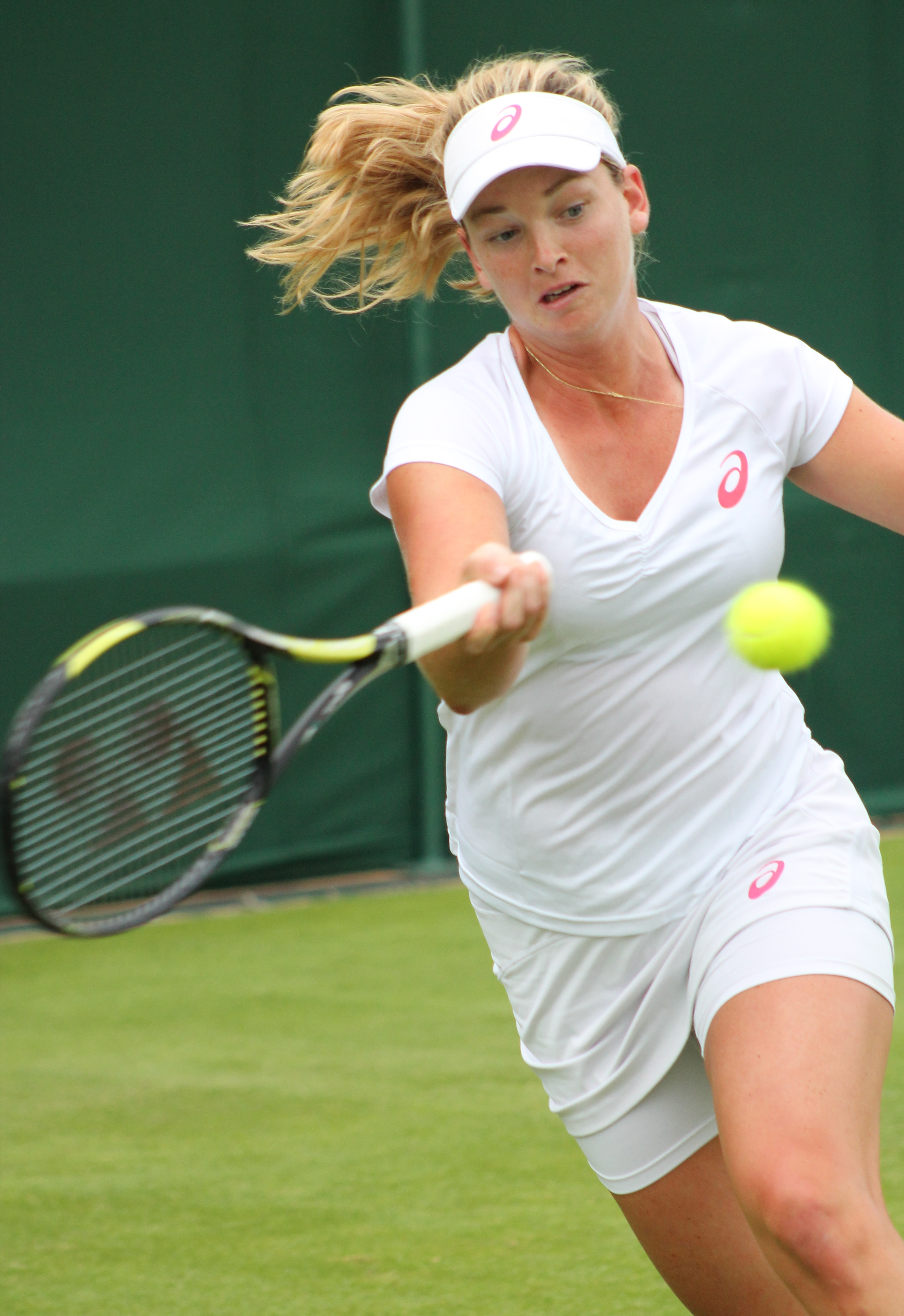 Vandeweghe WM14 (7)